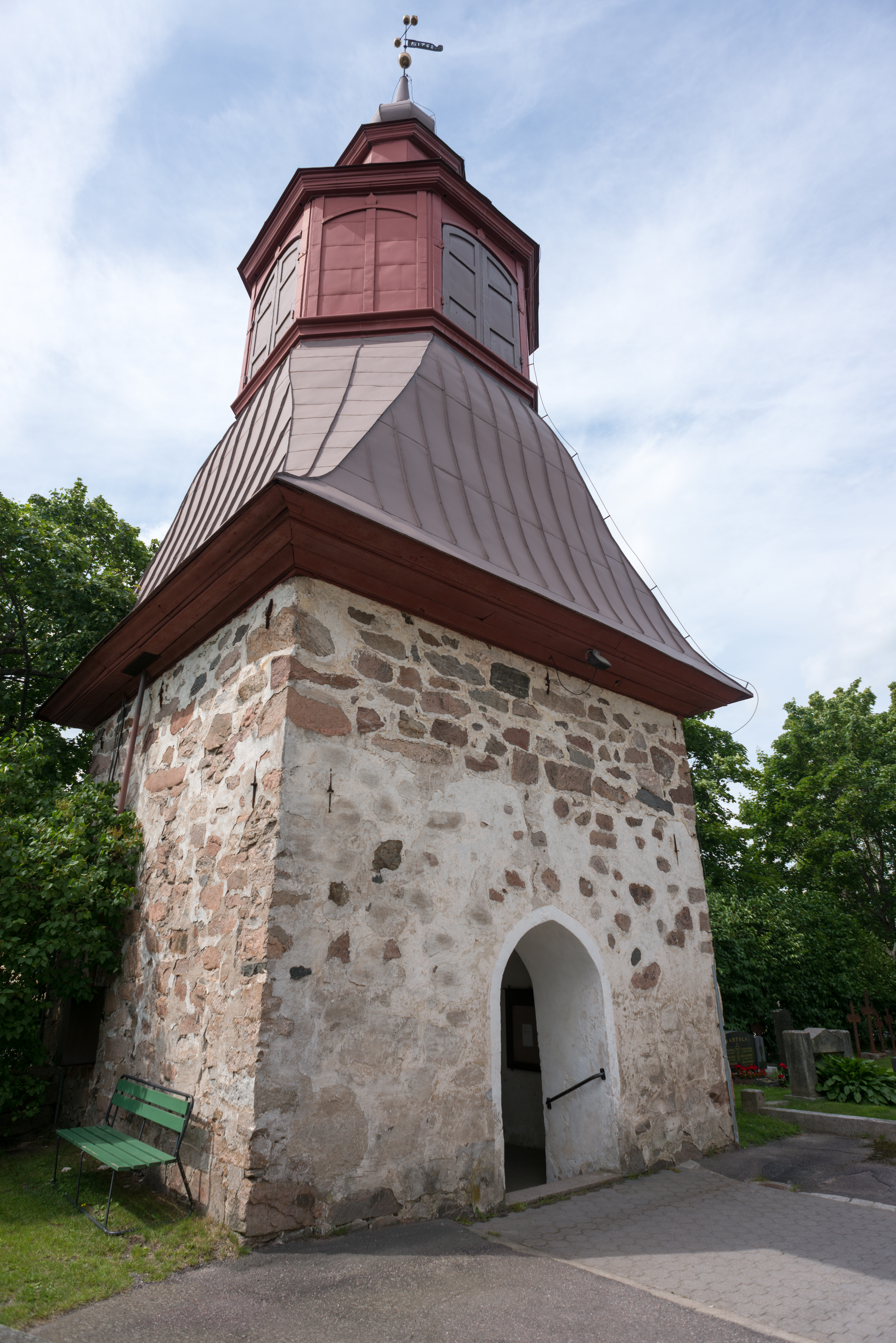 Pyhän Mikaelin kirkko Paimiossa